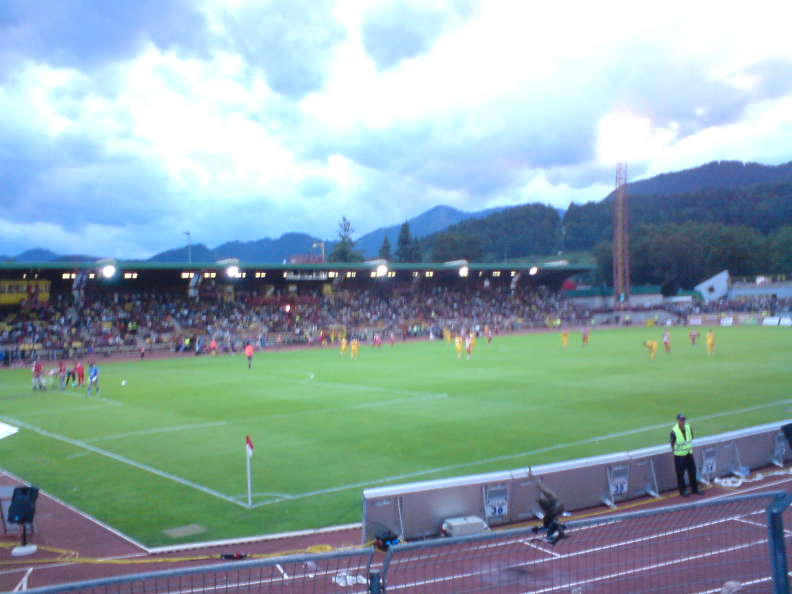 Franz-Fekete-Stadion beim Steirer-Derby Kapfenberger SV gegen SK Sturm Graz am 9. August 2008